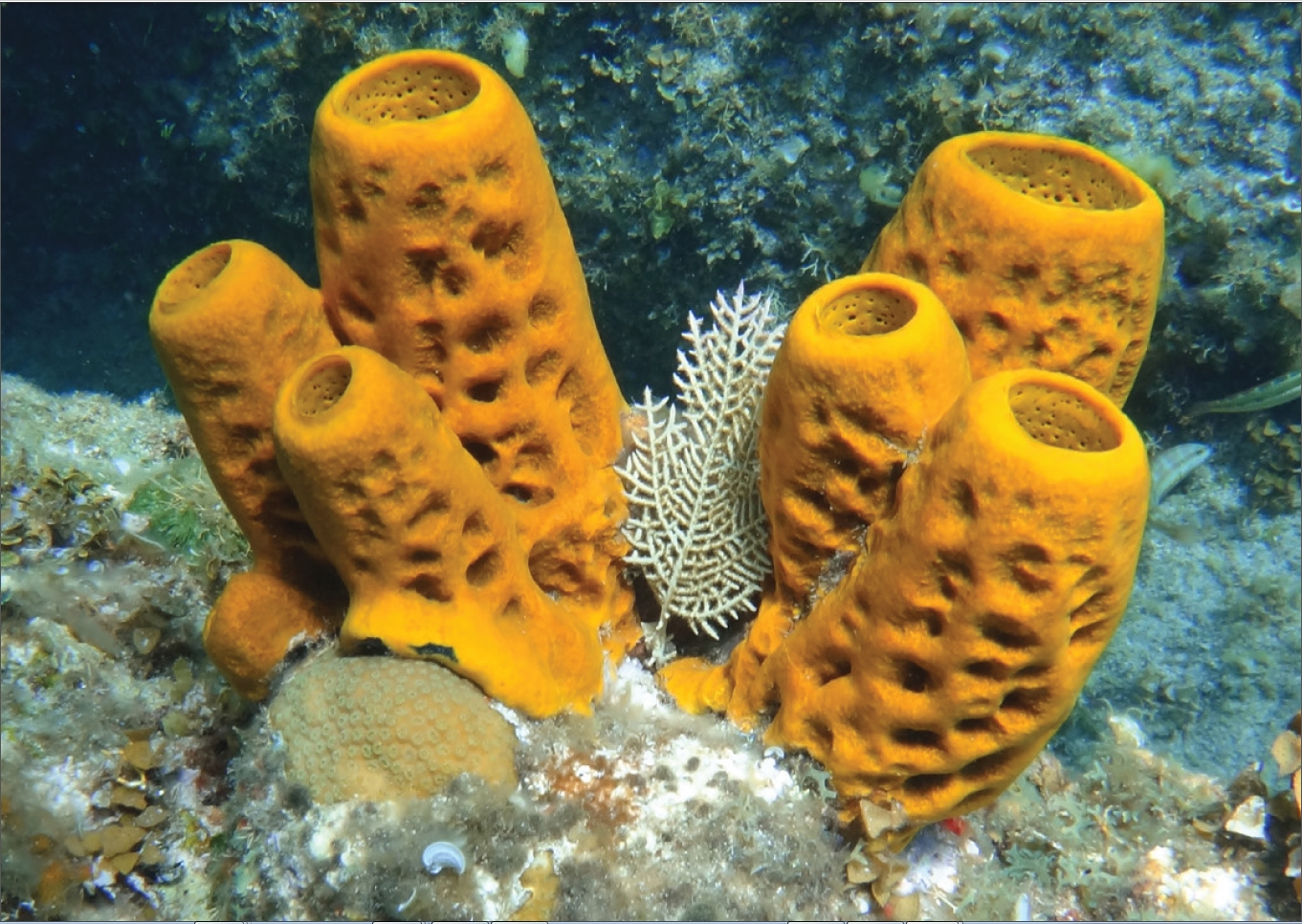 A Guantanamo sponge